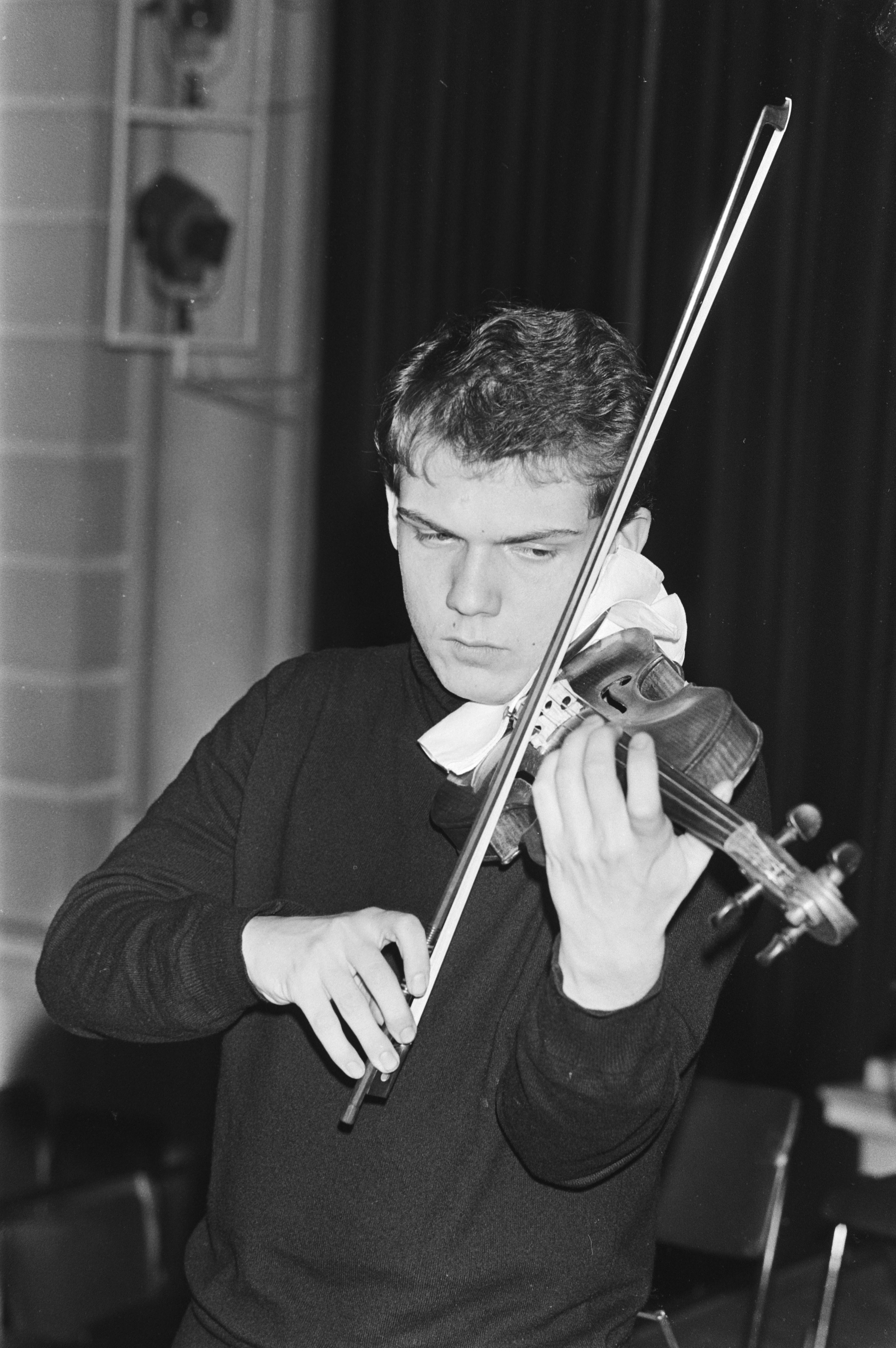 Collectie / Archief : Fotocollectie Anefo Reportage / Serie : Concert van violist Jaap van Zweden in het Concertgebouw in Amsterdam Beschrijving : Violist Jaap van Zweden aan het spelen Datum : 21 januari 1981 Locatie : Amsterdam, Noord-Holland Trefwoorden : musici, muziek, snaarinstrumenten, violen Persoonsnaam : Zweden, Jaap van Fotograaf : Croes, Rob C. / Anefo, [onbekend] Auteursrechthebbende : Nationaal Archief Materiaalsoort : Negatief (zwart/wit) Nummer archiefinventaris : bekijk toegang 2.24.01.05 Bestanddeelnummer : 931-2773